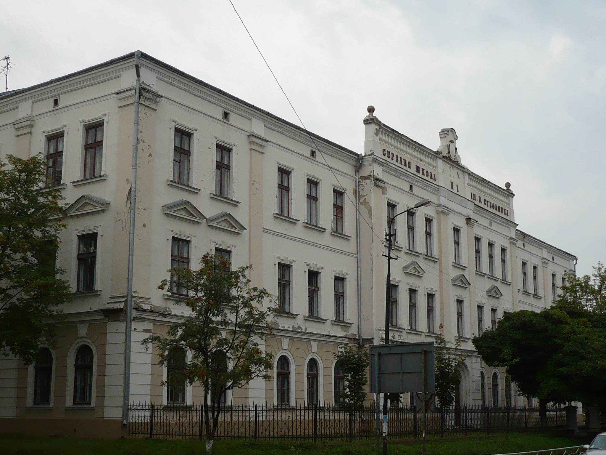 Byłe Gimnazjum Kazimierza Jagiellończyka w Kołomyji na Ukrainie, 2009 r.